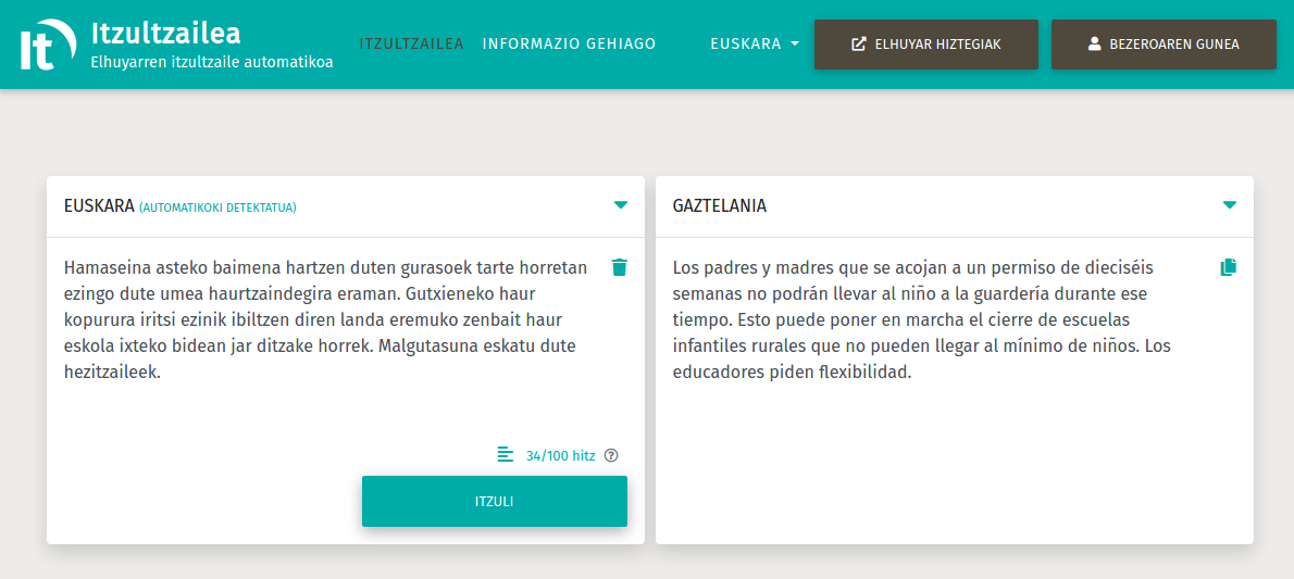 Elhuyar Fudazioak sortutako "itzultzailea.eus" itzultzaile automatiko neuronalaren webgunearen pantaila-argazkia, euskaratik gaztelaniara berriako albiste bat itzultzen.